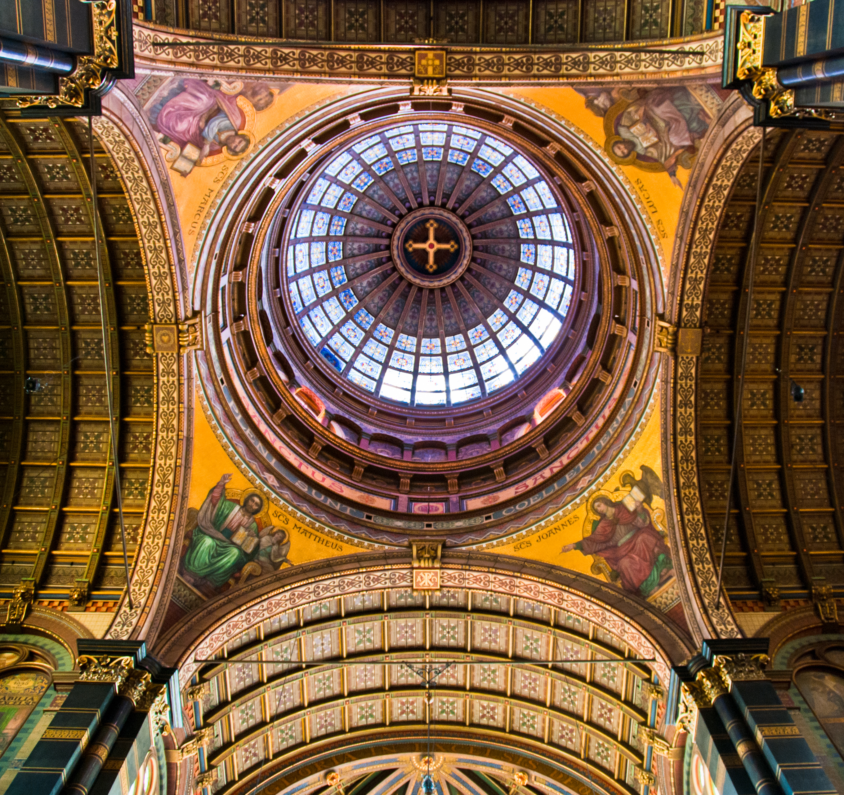 St Nicolaaskerk, Amsterdam